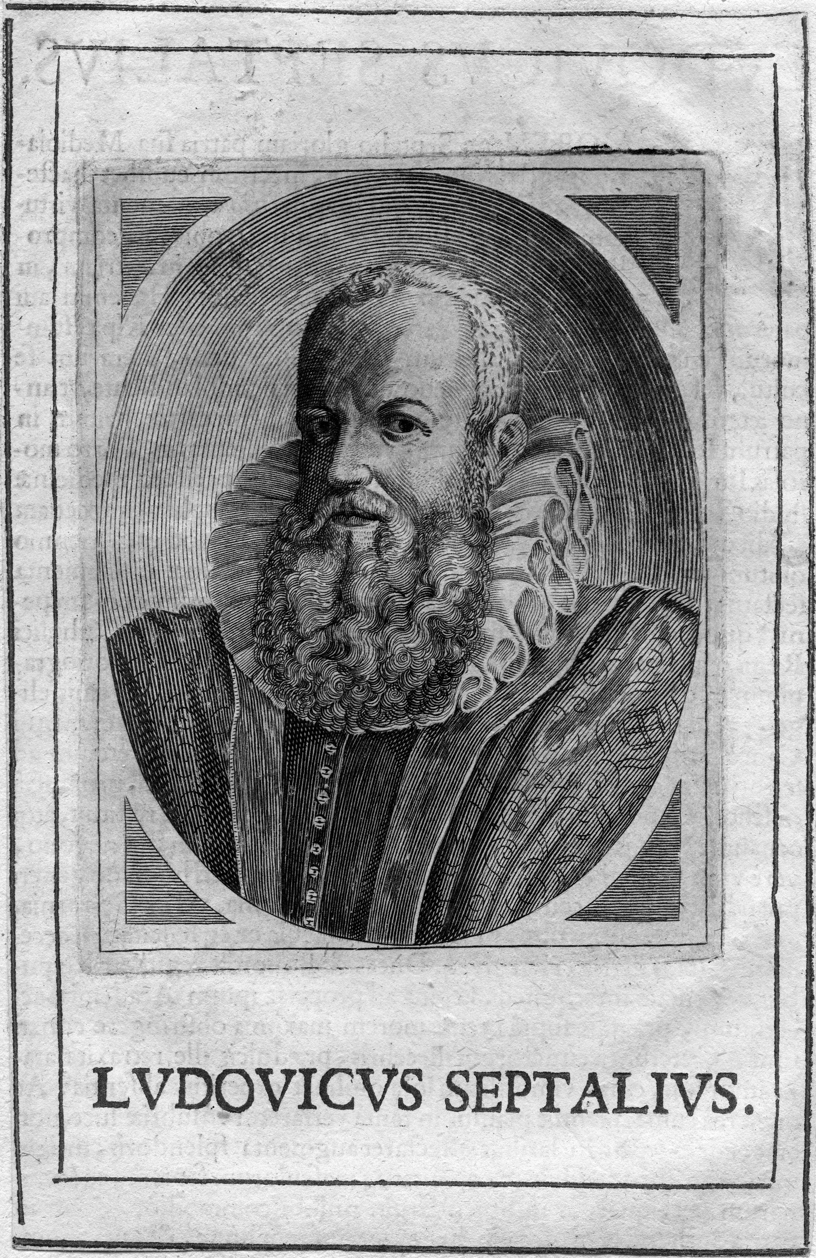 portrait gravé